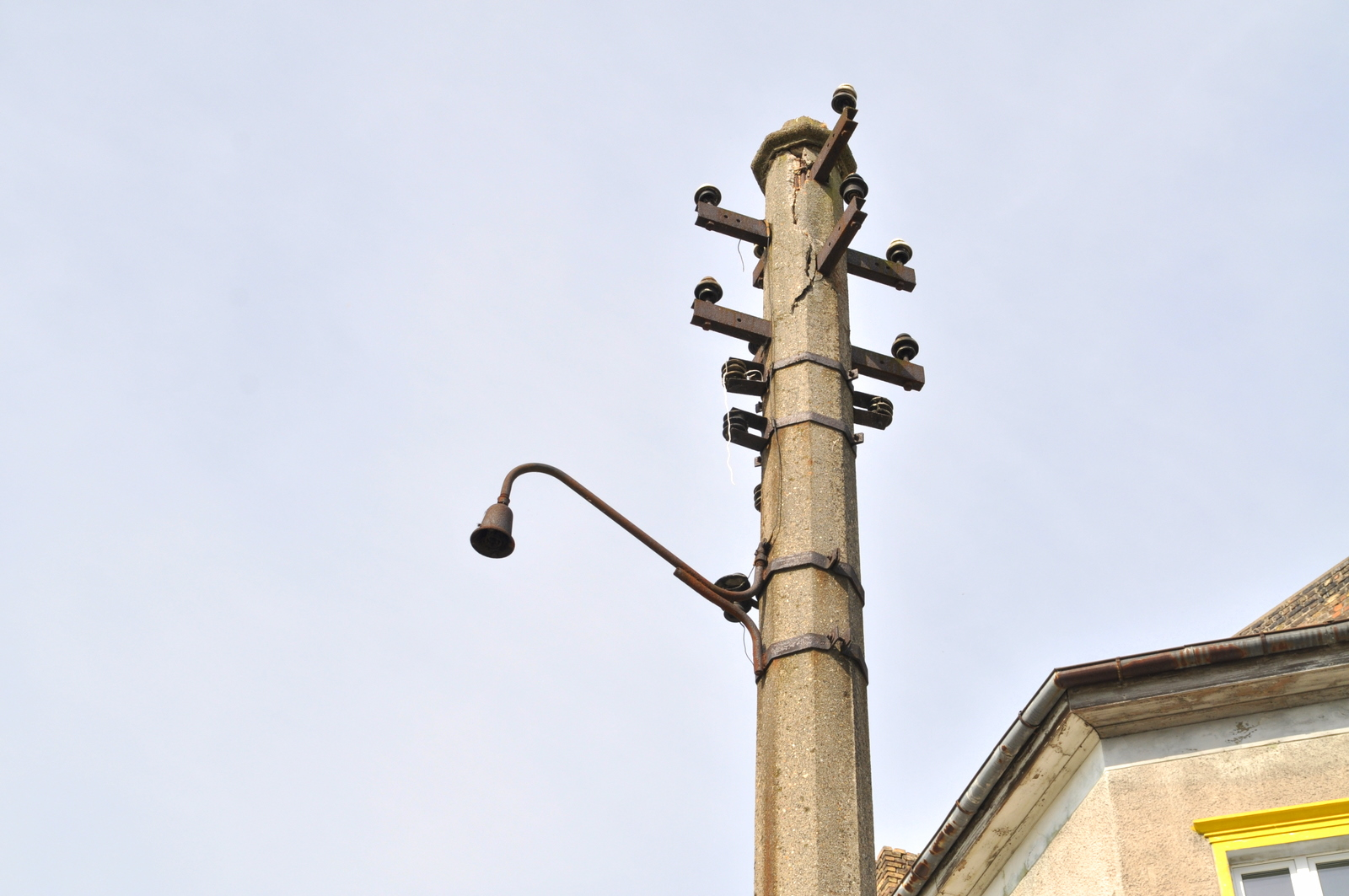 Gorzów Wielkopolski - pozostałości po trakcji trolejbusowej